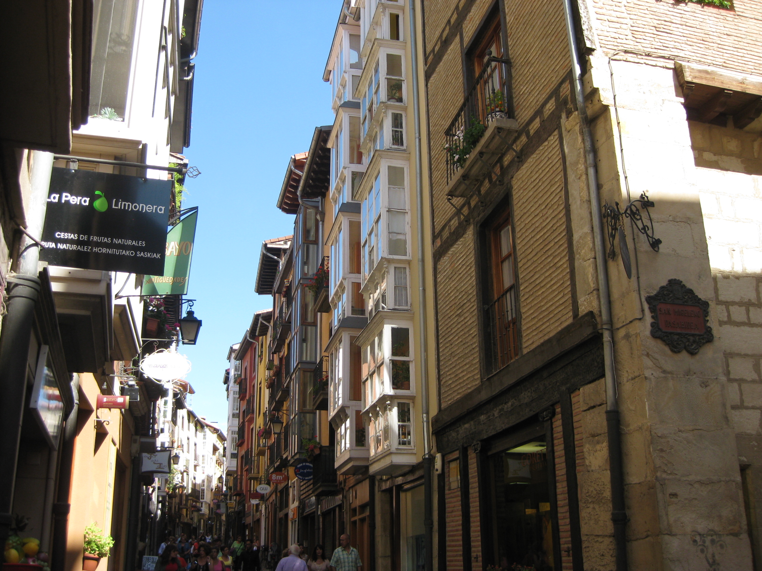 RI-53-0000374 Calle Correría en el Casco Medieval de Vitoria-Gasteiz